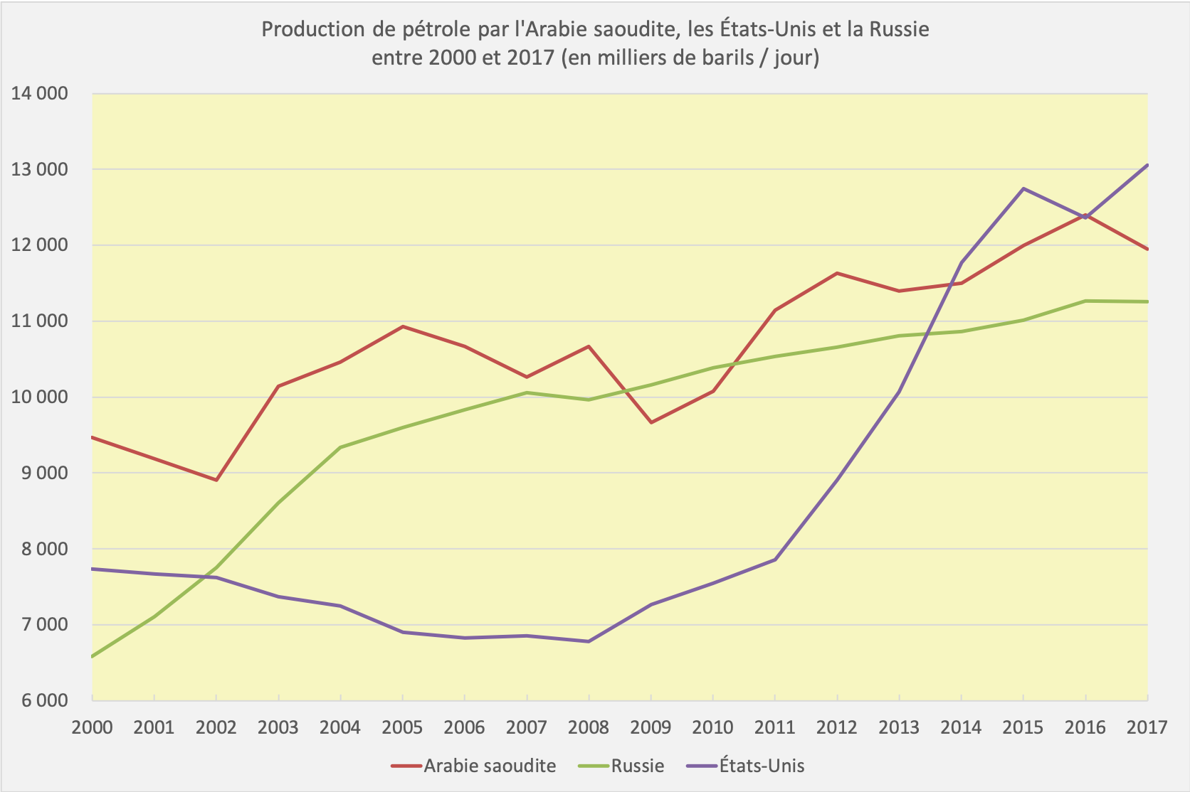 Graphique montrant l'évolution de la production de pétrole par les trois plus gros producteurs entre 2000 et 2017 (données extraites du BP Statistical Review of World Energy June 2018)